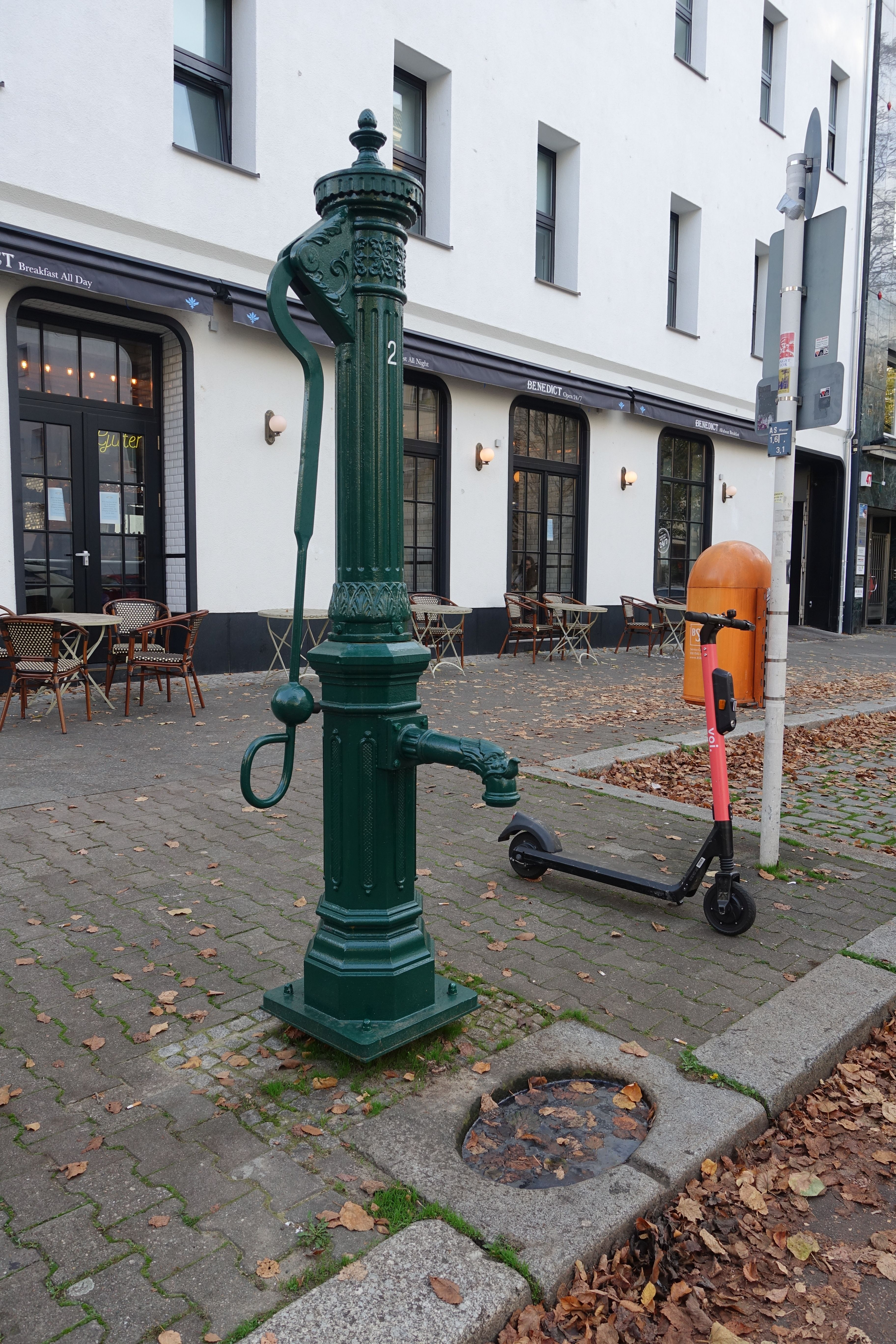 Straßenbrunnen in der Pariser Straße, westlich der Uhlandstraße in Berlin-Wilmersdorf